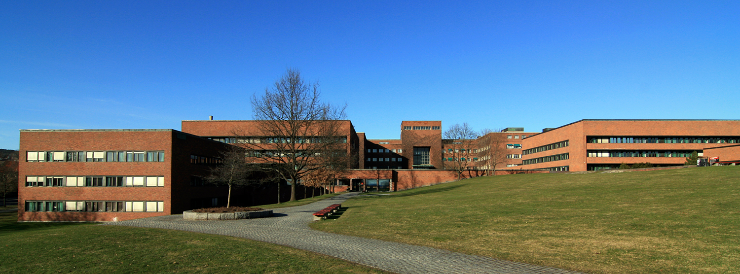 Kjemibygningen, Blindern. Oppført 1969; arkitekter Hans Anmarkrud og Rolf Ramm Østgaard.